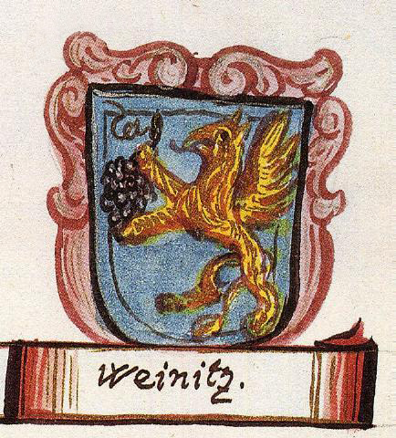 Viniški grb v Valvasorjevi Veliki grbovni knjigi